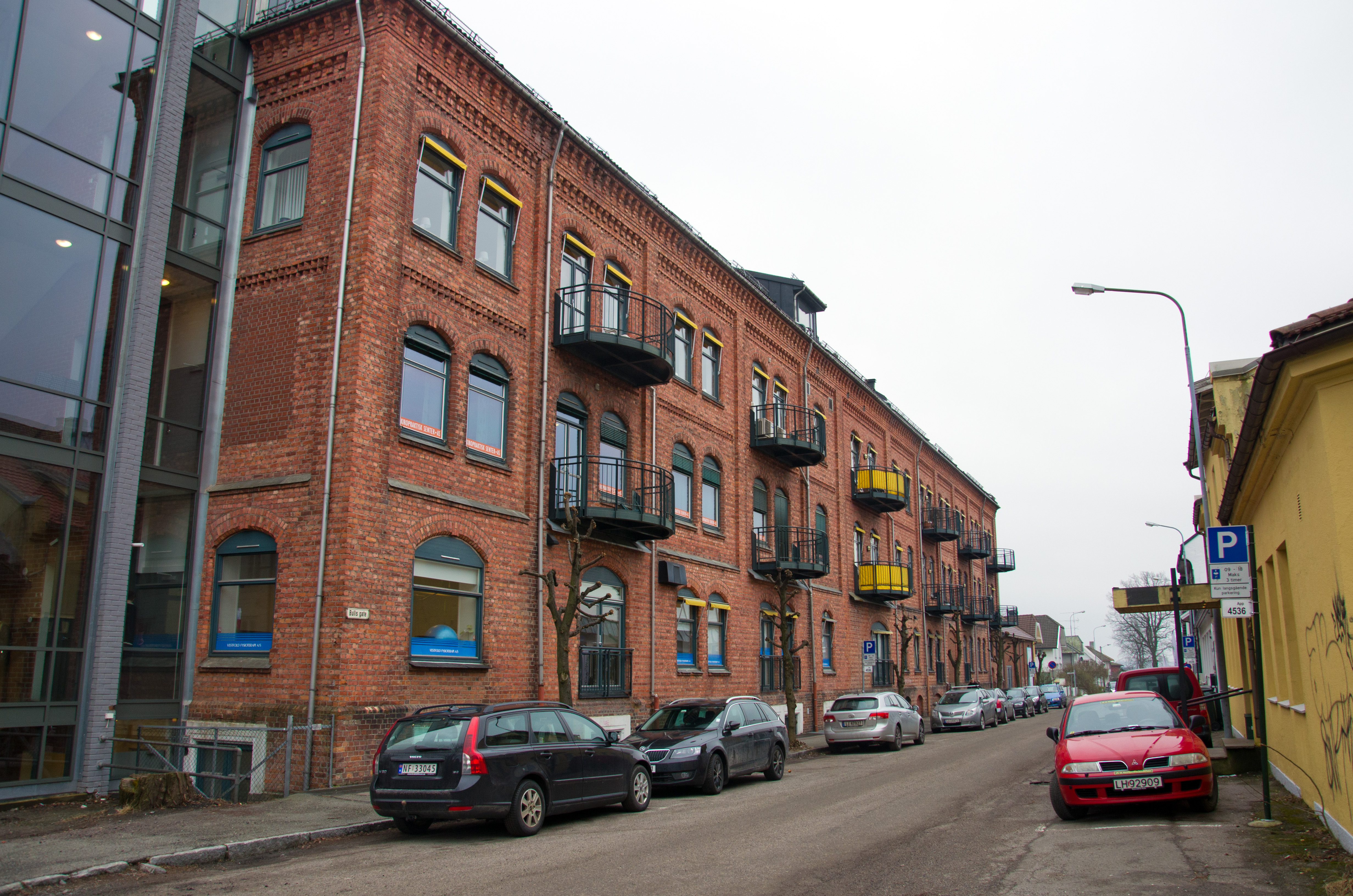 Bulls gate 2 i Tønsberg